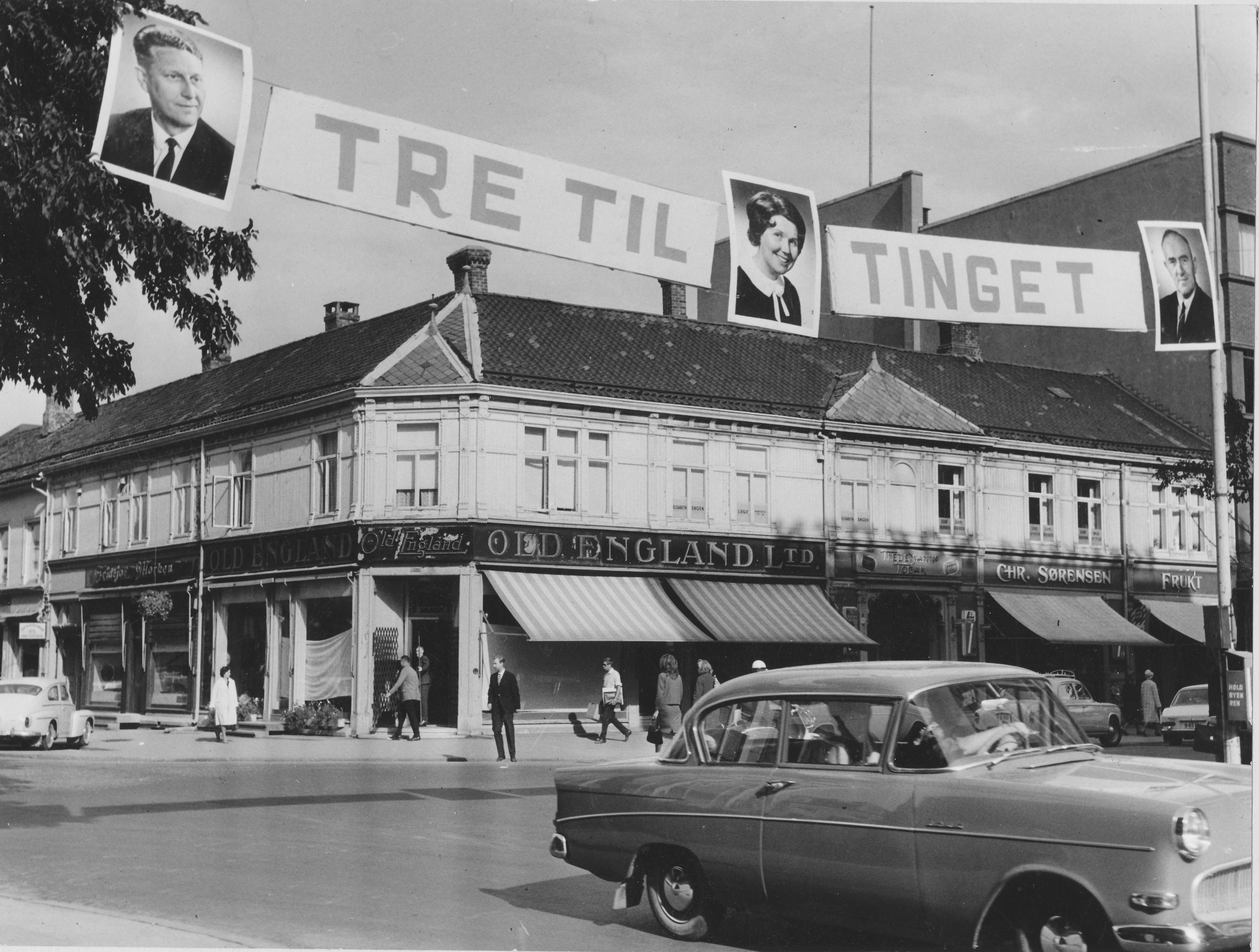 Dronningens gate 14 hjørnet Nordre gate like før stortingsvalget i september 1965 . Kvartalet brant ned 6. desember 2002. Forretningene Fridtjof Morken, Old England og Chr. Sørensen lå i gårdens første etasje. Ukjent fotograf. Valgkampbanneret viser Otto Lyng (til venstre) og Martin Skaaren fra Sør-Trøndelag Høyre som begge kom inn på Stortinget.